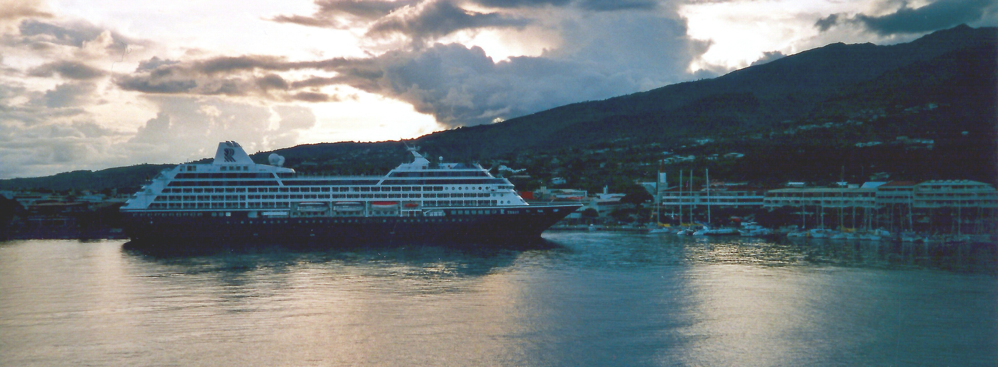 Hafen Papeete Tahiti